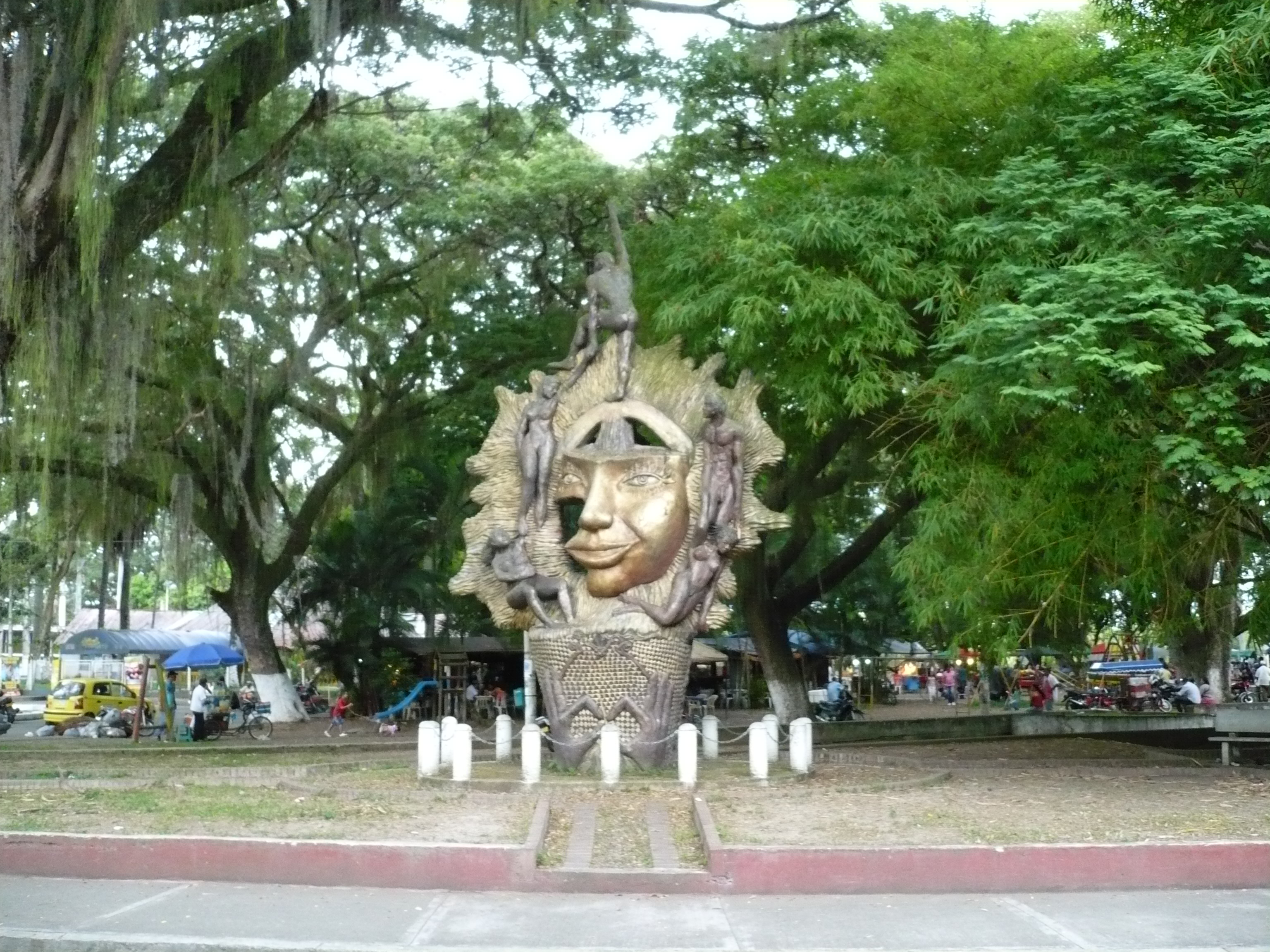 Parque La Isleta Avenida del Río con calle 9 Cartago, Valle, Colombia